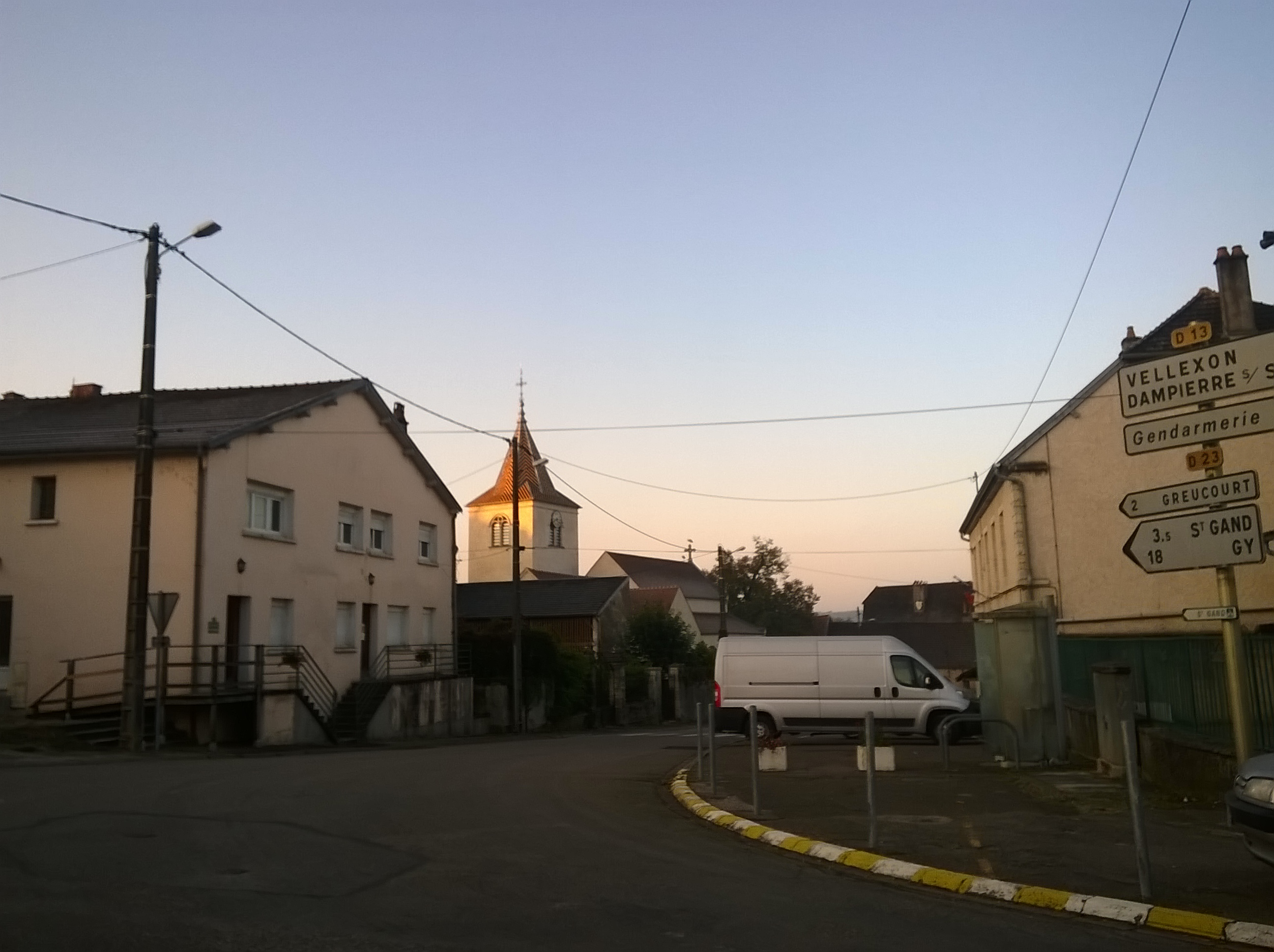 Fresne-Saint-Mamès